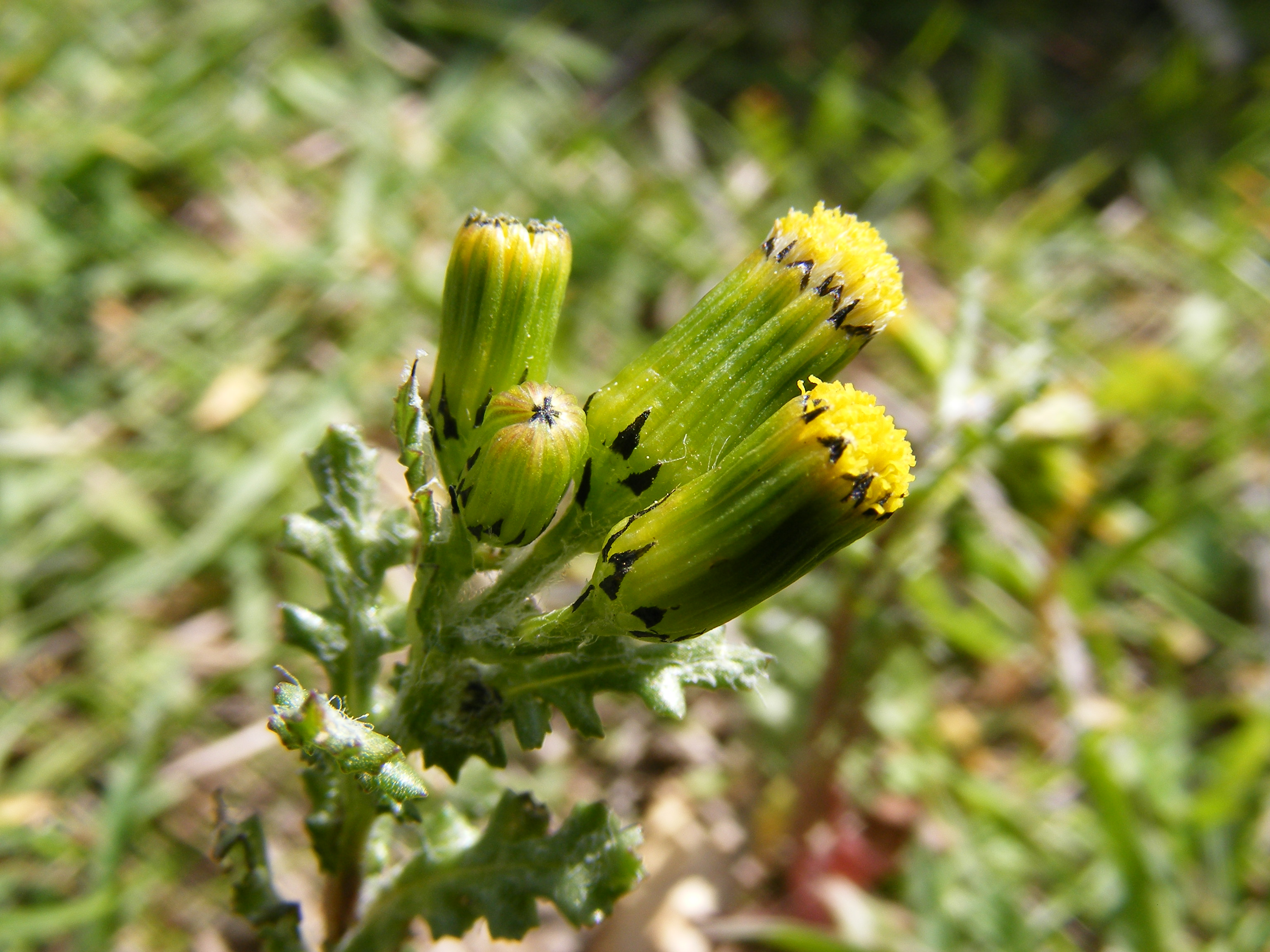 Klein kruiskruid (Senecio vulgaris) I took this in France, thought it was nice :)